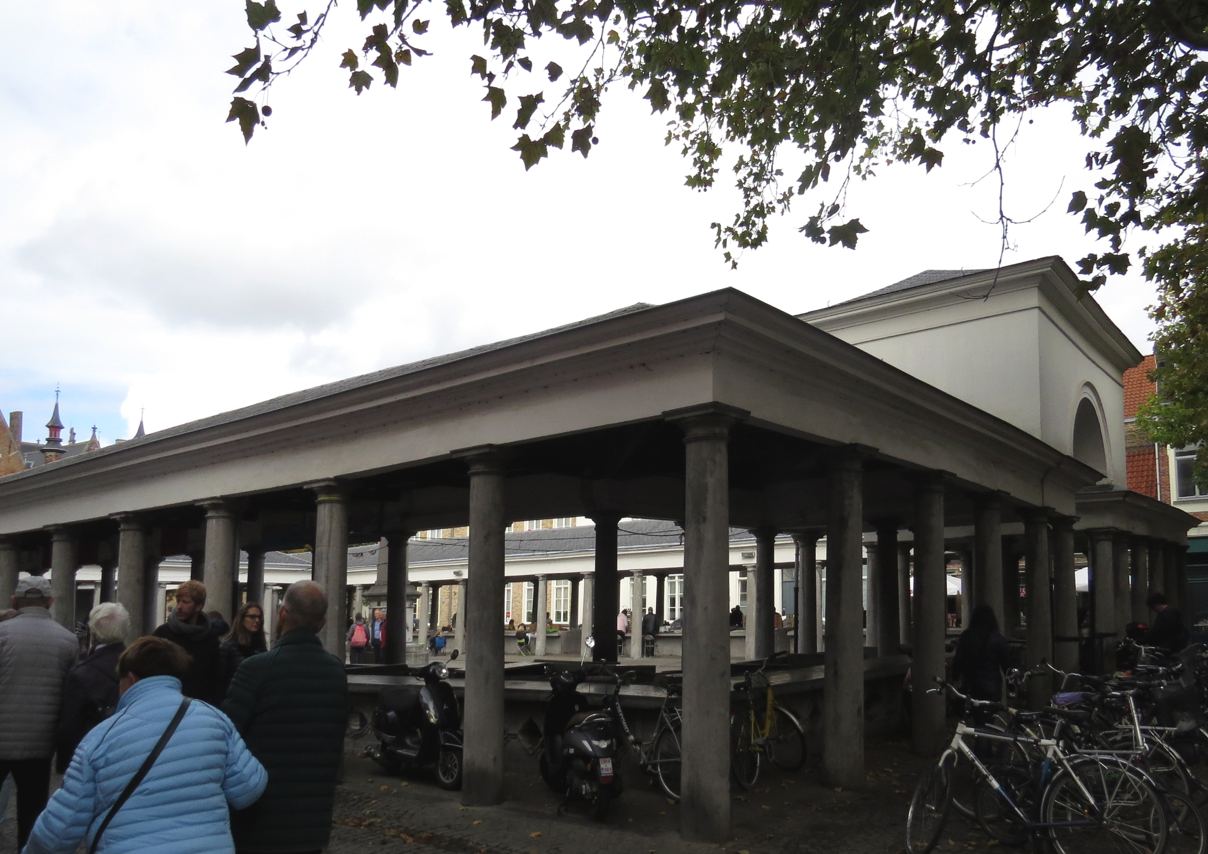 Brügge in Belgien, Fischmarkt